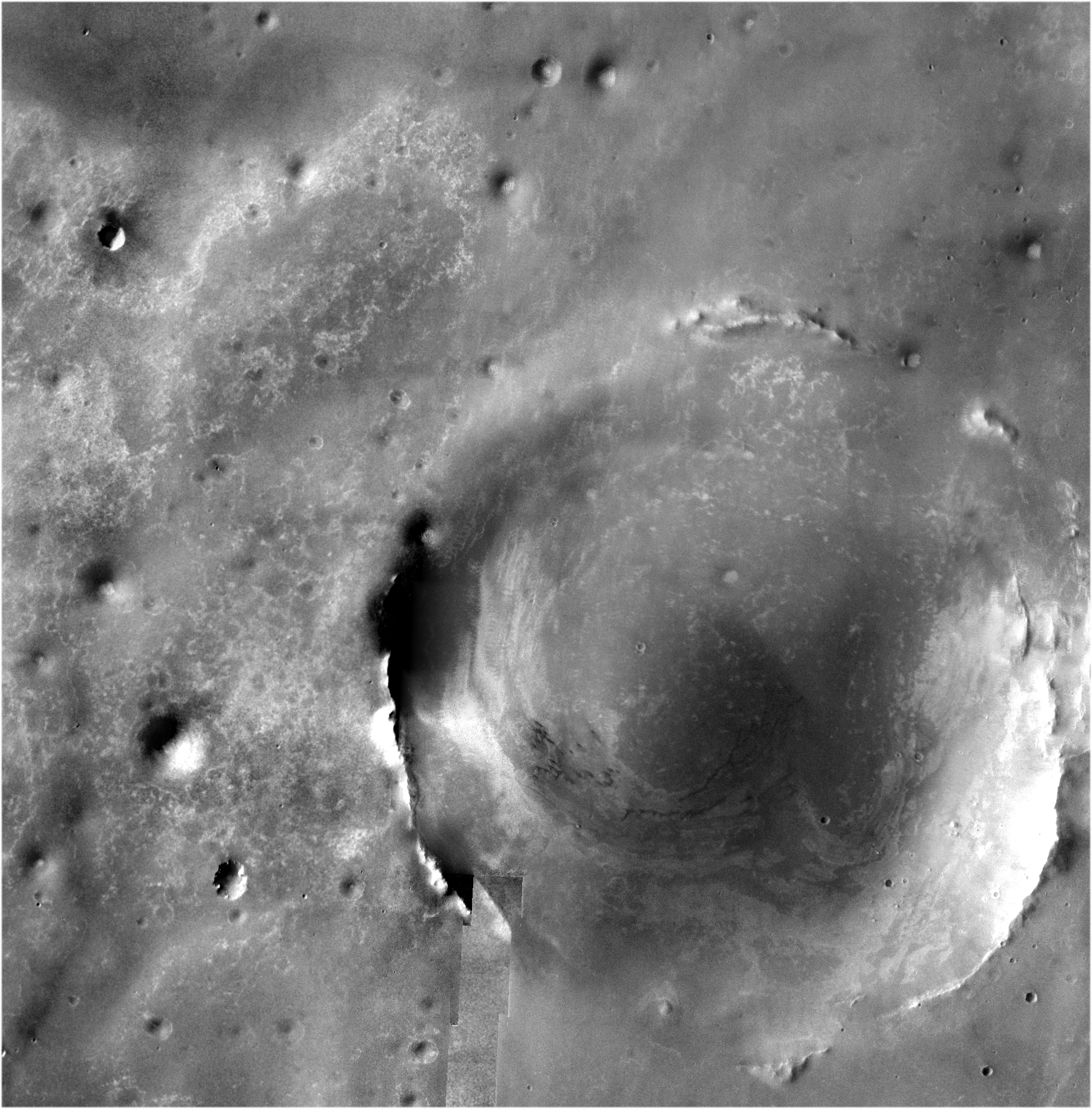 "Endeavour" crater in Meridiani Planum.